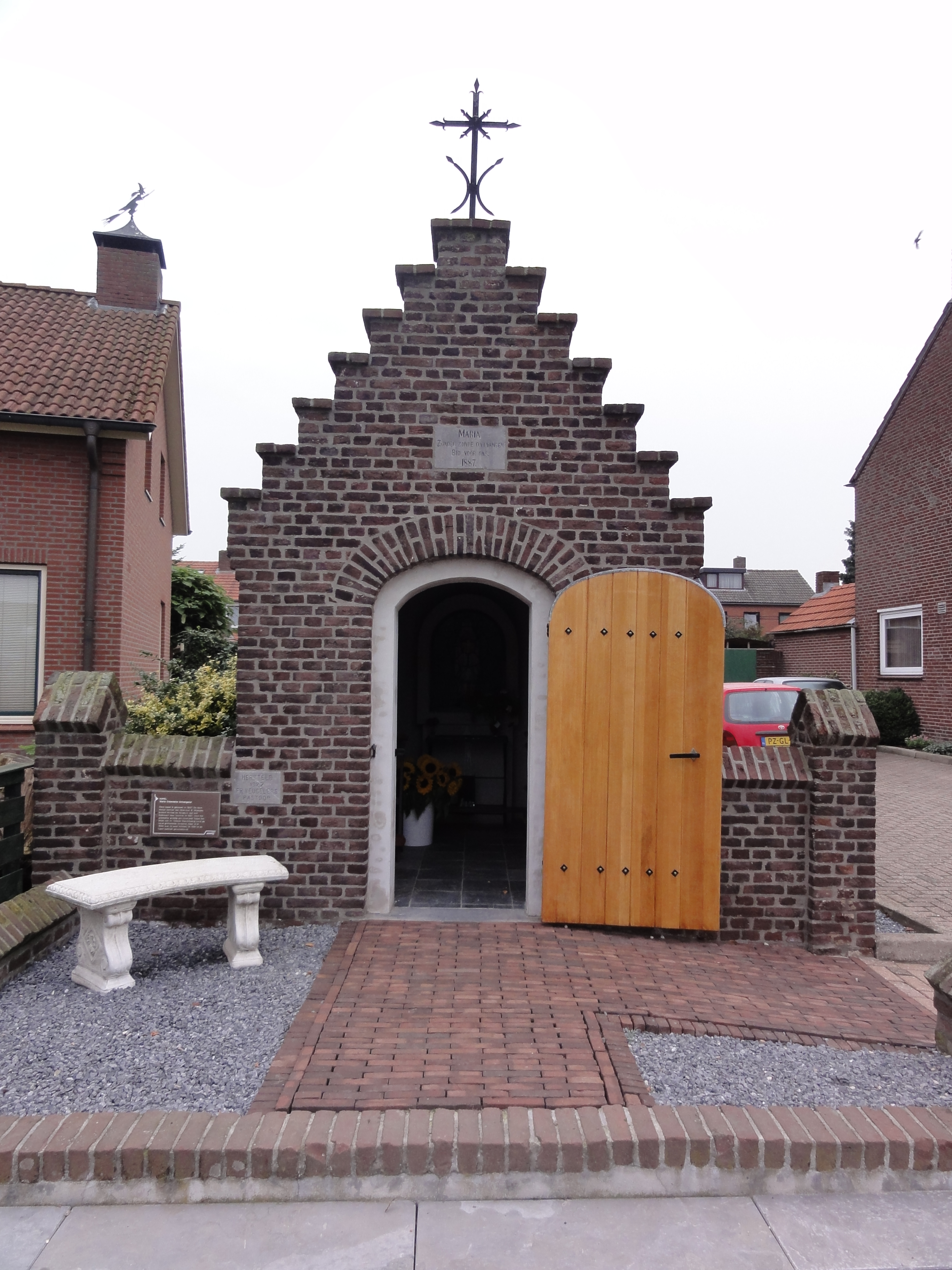 Heumen Rijksmonument 30076 Mariakapelletje 53″ N, 5° 54′ 35.85″ E